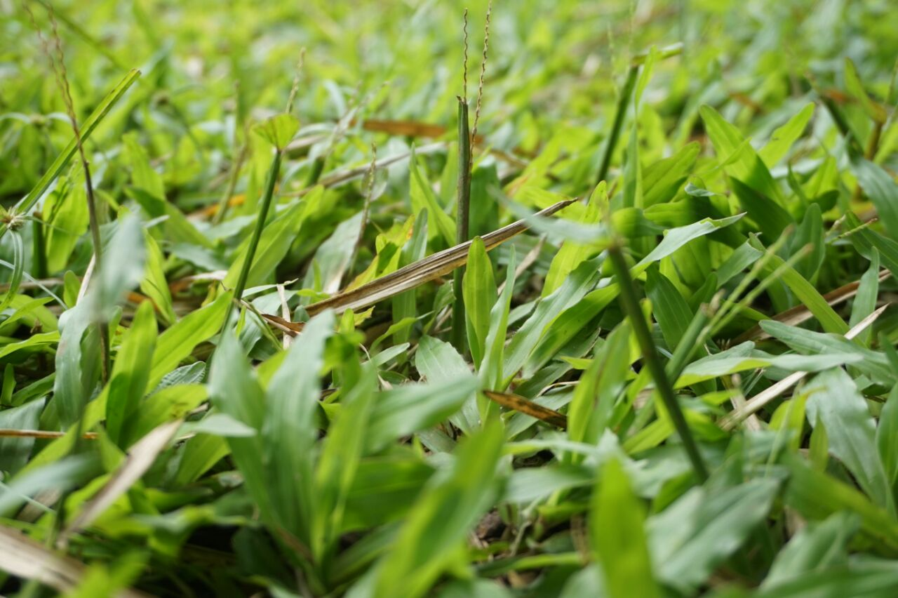 Rumpuik adalah bahasa minang yang berarti rumput